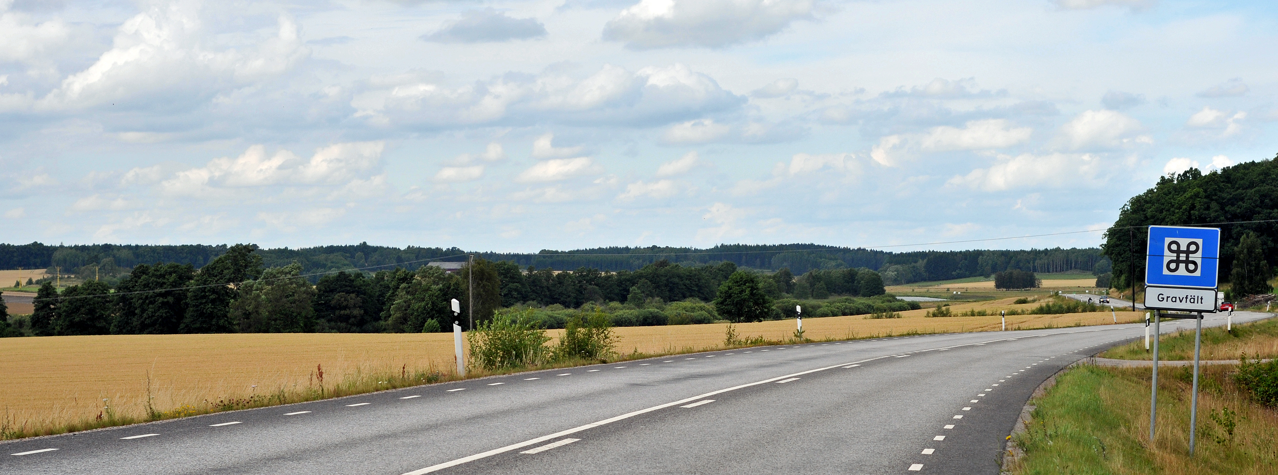 Nyköpingsåns dalgång utmed väg 53, Nyköpings kommun